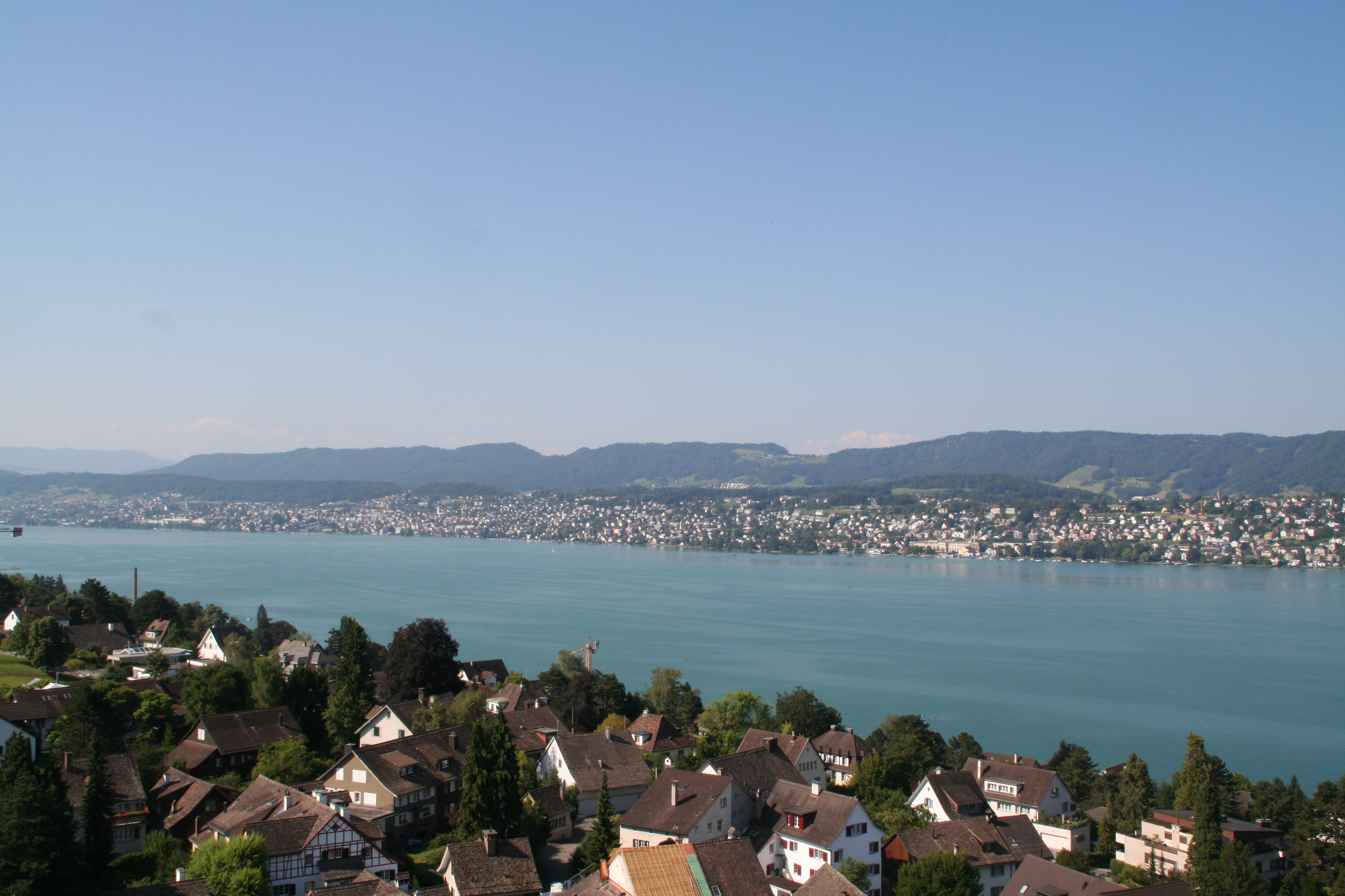 Zollikon Blick nach Süden über Zimmerberg und Albis